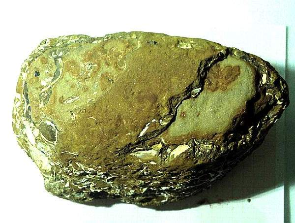 Fundstücke Holsteiner Gestein aus einer Kiesgrube in Lübeck Kücknitz